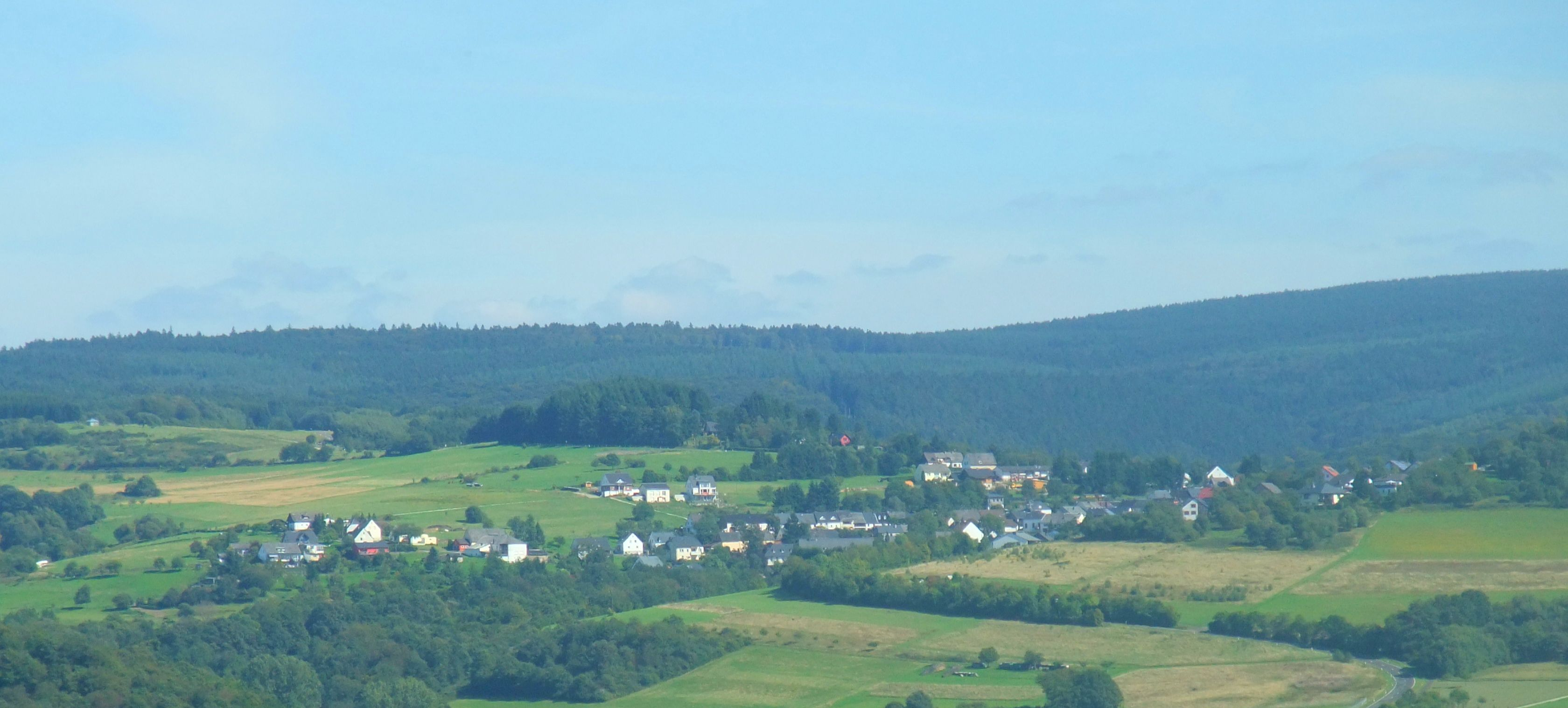 Holzerath